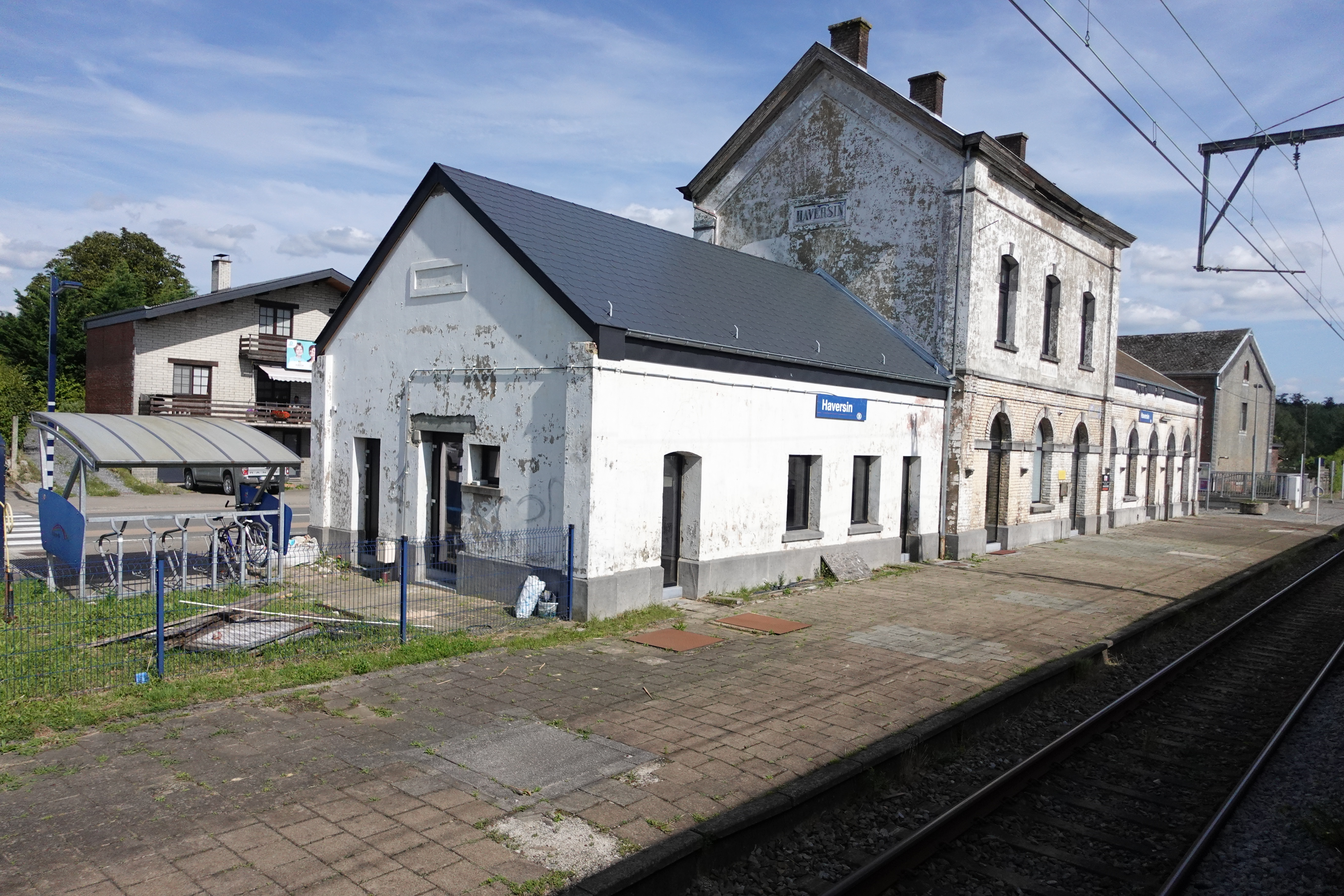 La gare d'Haversin, vue depuis un train IC Arlon-Namur circulant à contrevoie